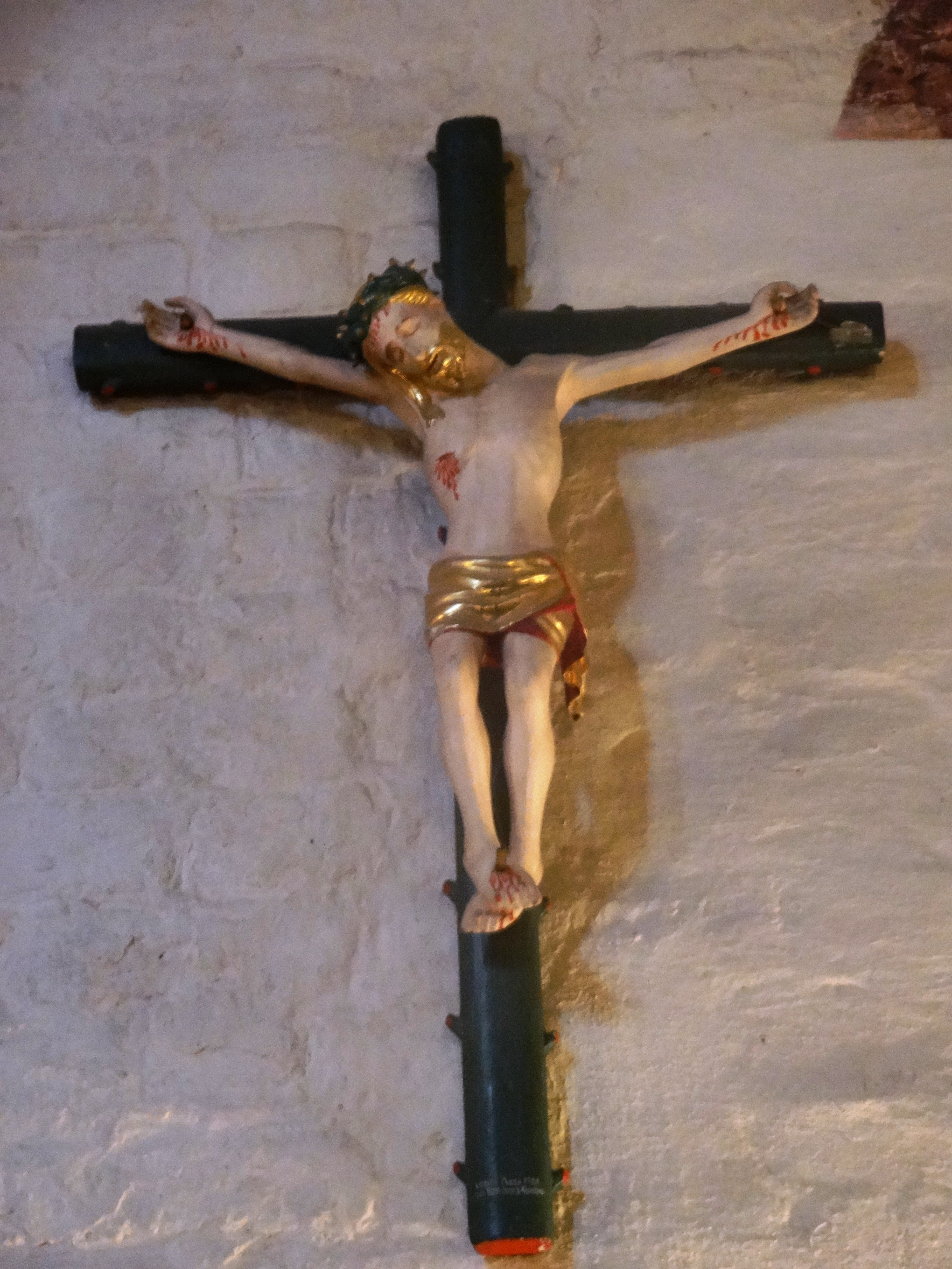 Baumstammkreuz, Kirche Berkenthin, 14. Jh.